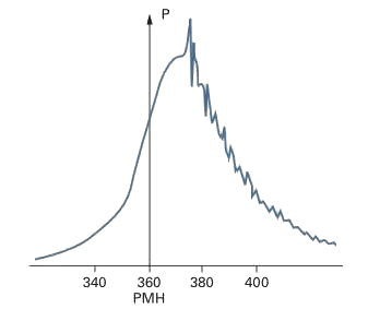 Graphe du phénomène de cliquetis : pression=f(angle de rotation)